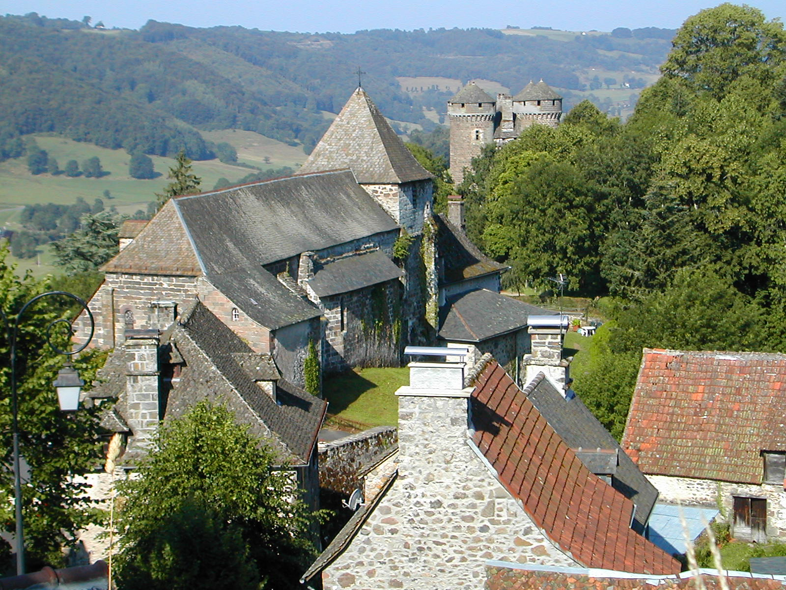 Village de Tournemire (Cantal, Auvergne, France).